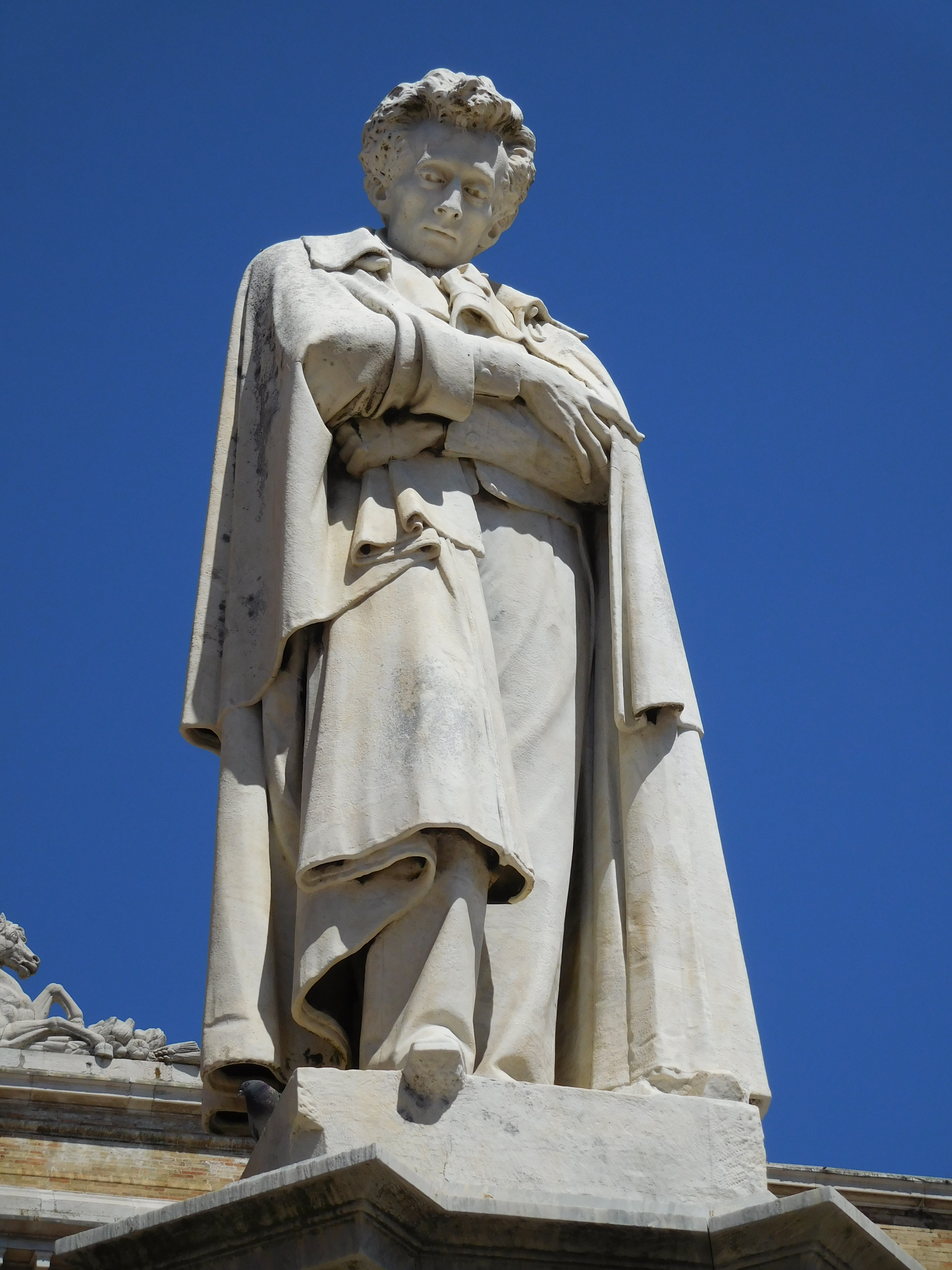 Recanati, Italia